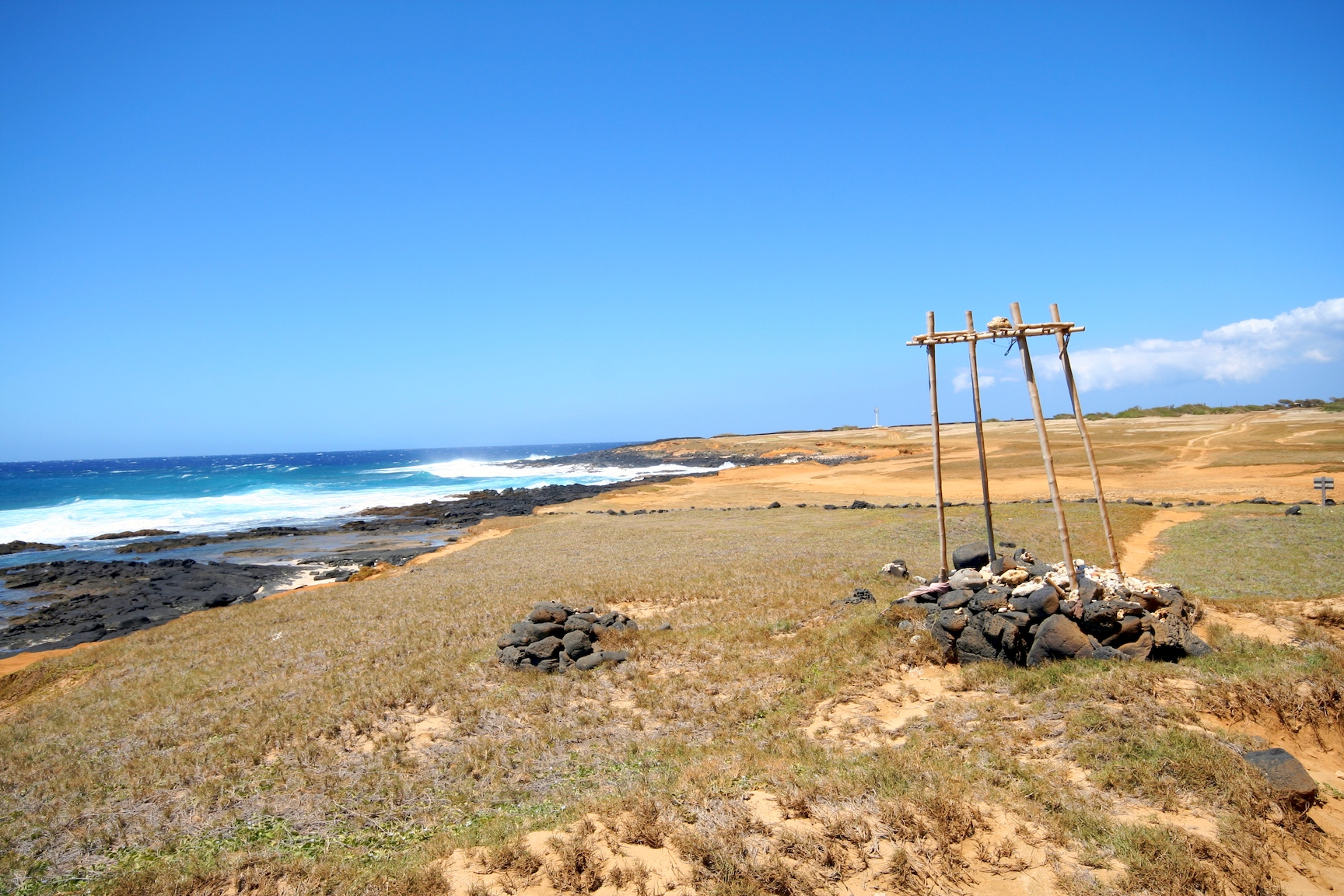 Gravesite at Ka Lae (Hawai'i Island)